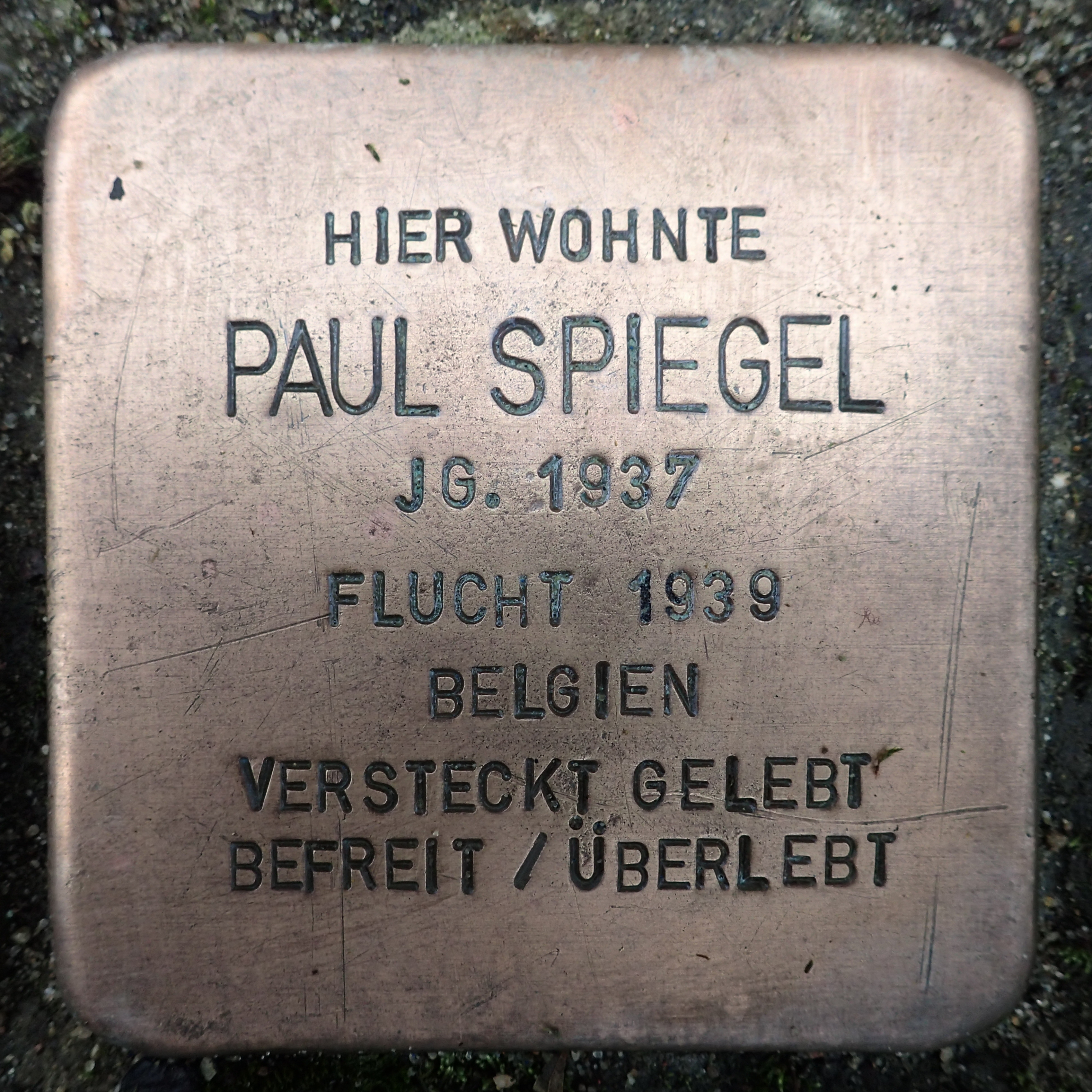 Stolperstein Warendorf Schützenstraße 17 Paul Spiegel